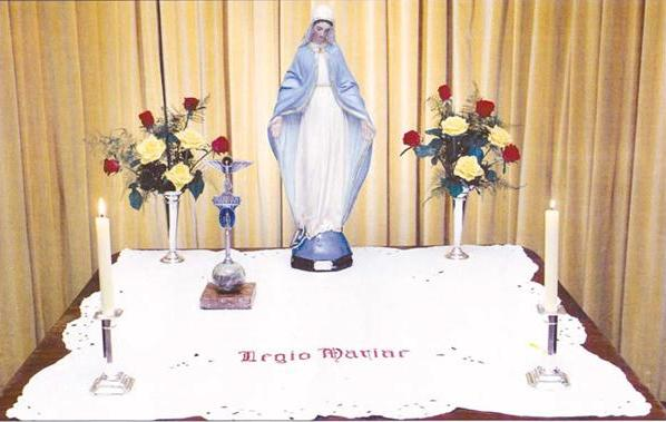 Altar de la Virgen utilizado en las reuniones de la Legión de María